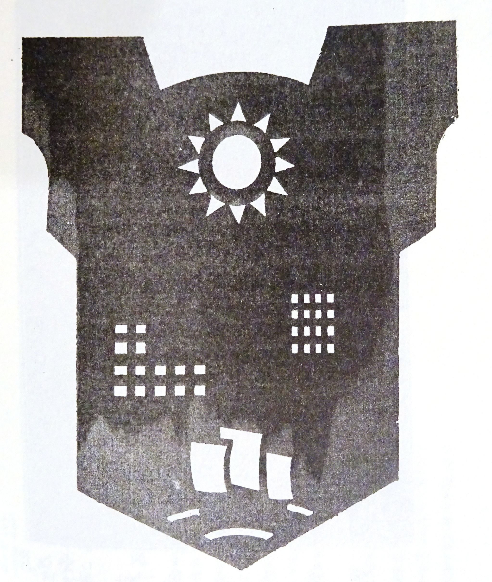 粵語: 廣東省立勷勤大學嘅校徽